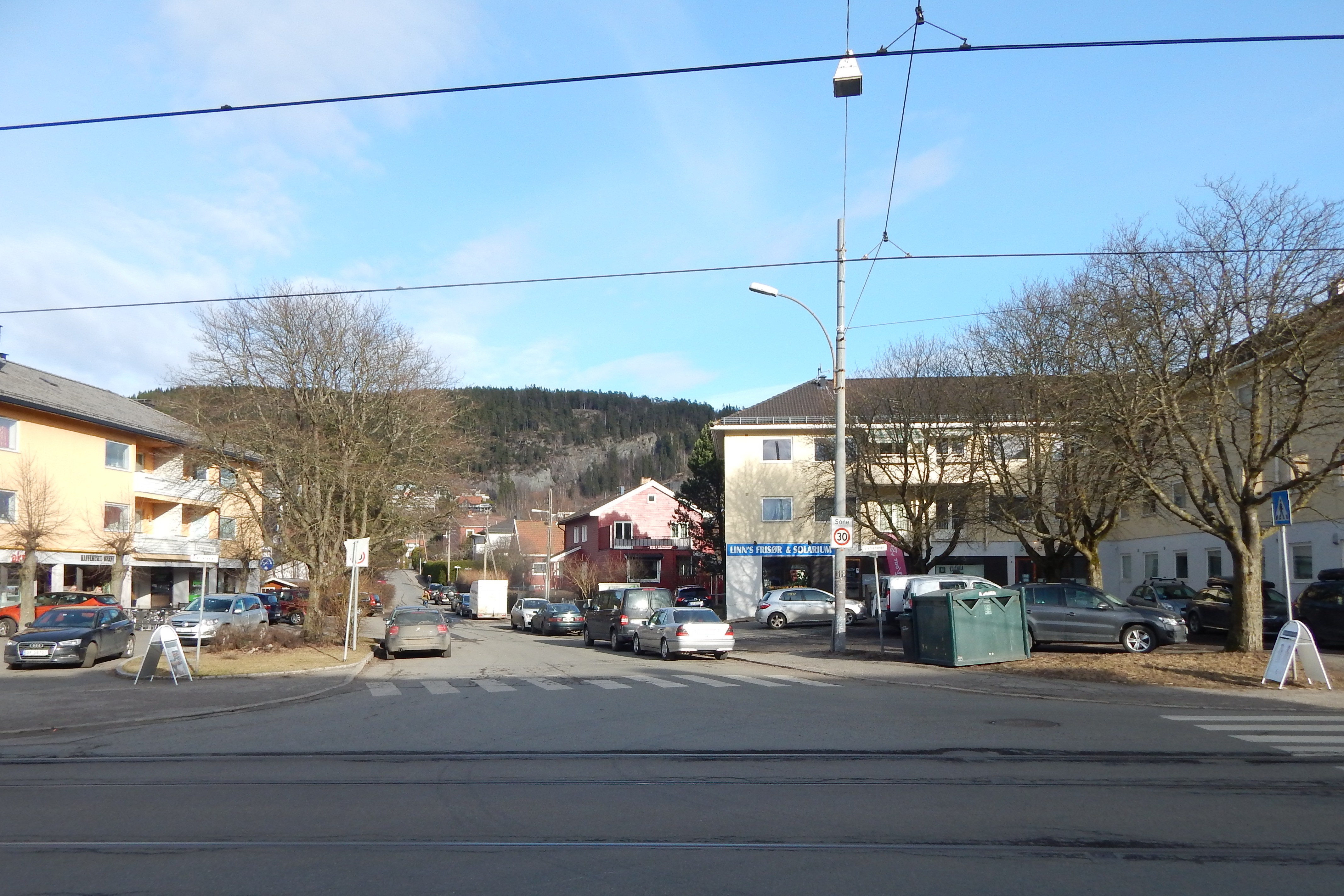 Lyngåsveien på Grefsenplatået